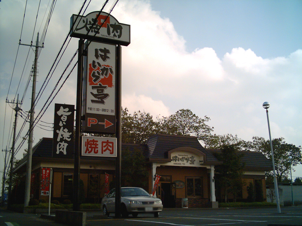 Haikaratei_Restaurant_japan photography day, 2006.10.31. photography person kici